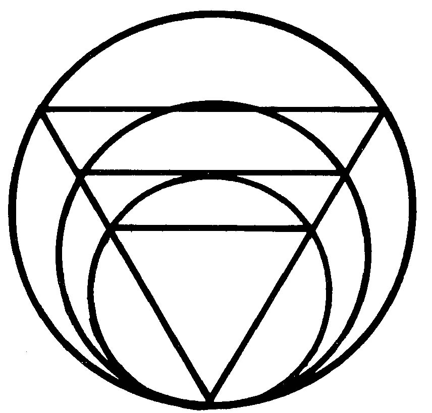 hantha0.jpg